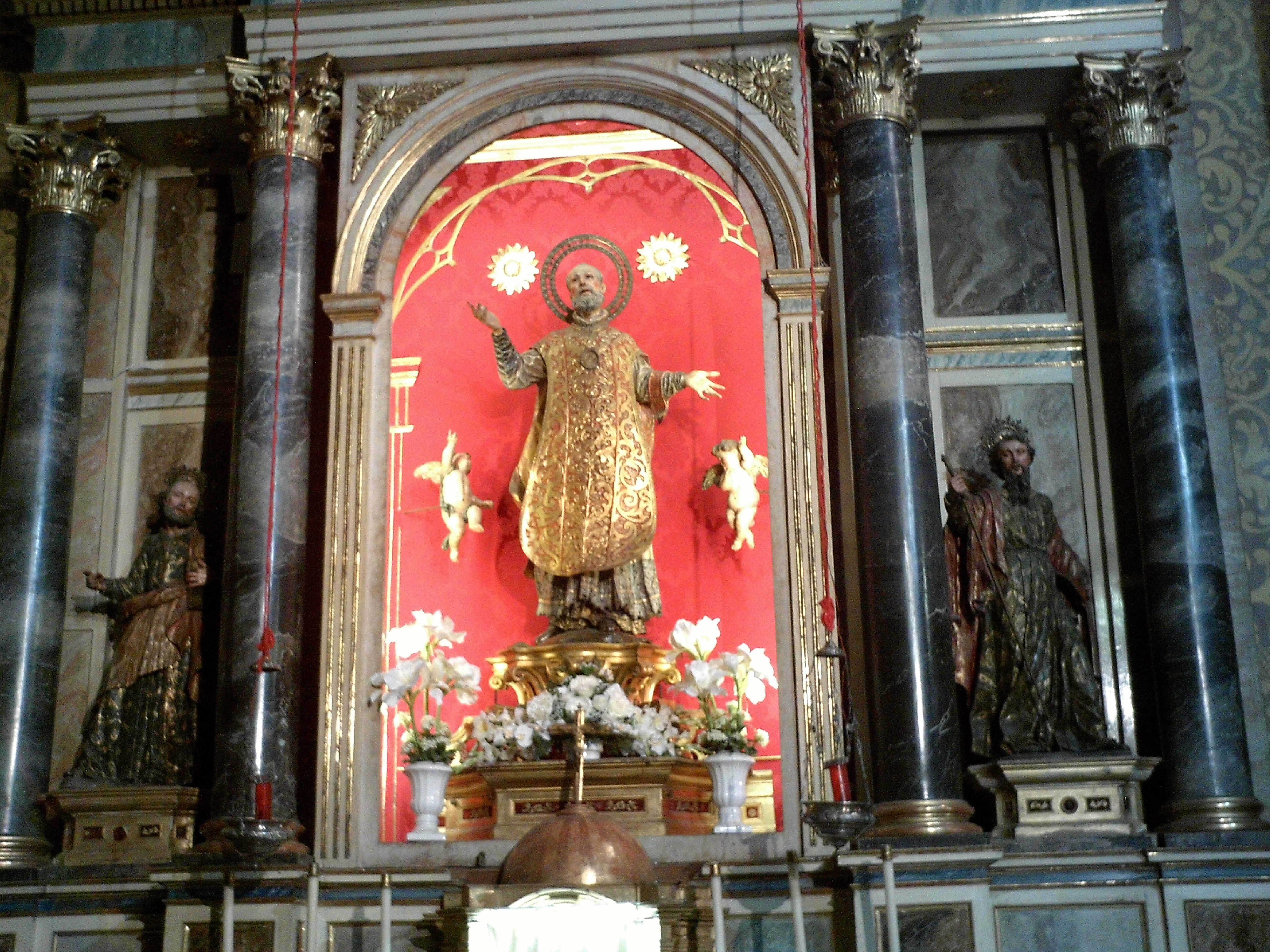 Retablo de San Felipe Neri, flanqueado por San Pedro y San Pablo. Iglesia de San Alberto. Sevilla, Andalucía, España.